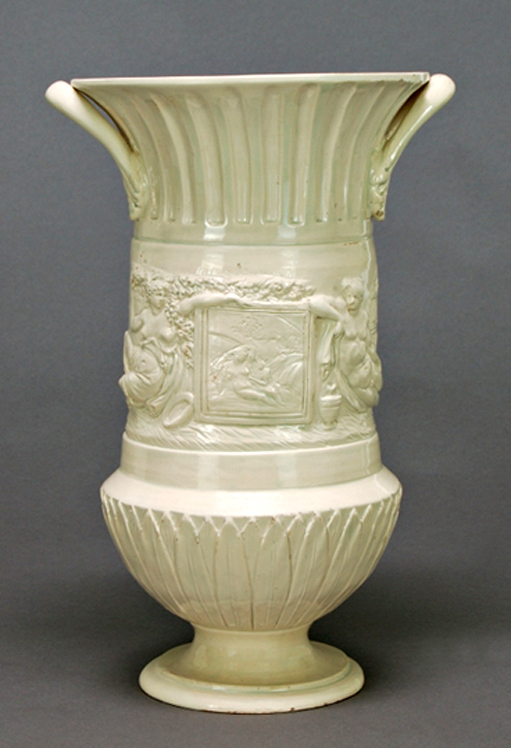 Vaso Impero in terraglia monocroma, Decoro in bassorilievo, con registro centrale raffigurante scene istoriate. Faenza fine del XVIII secolo.